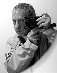 Gianni Ansaldi